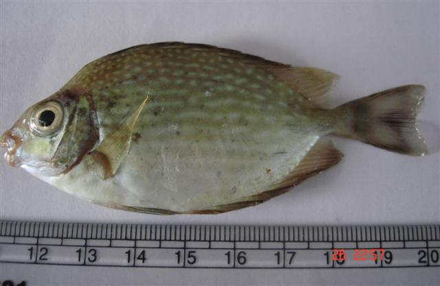 Siganus canaliculatus de 95 mm de largo. Tamil Nadu, Parangipettai, India, 2011.